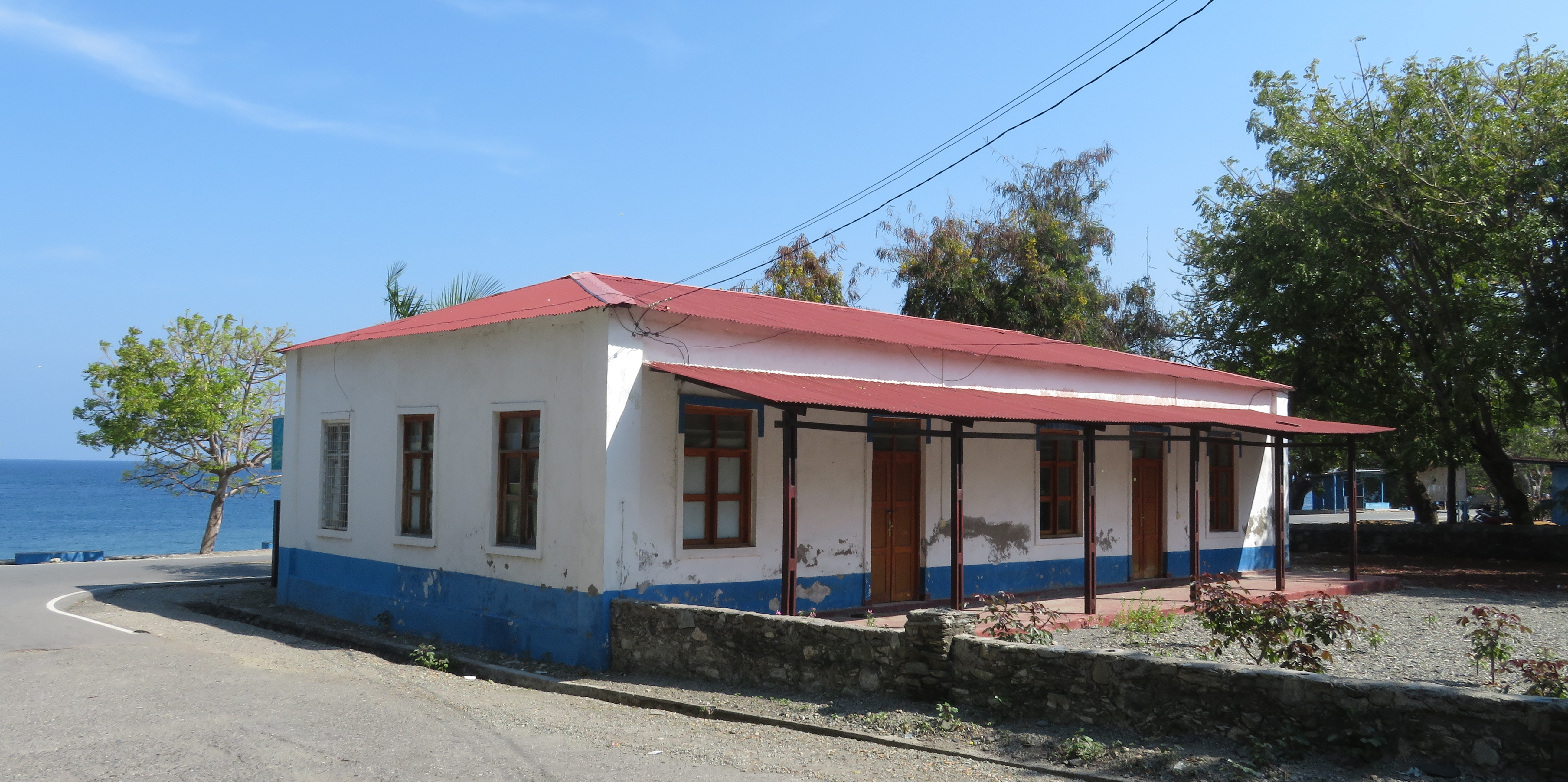 Altes Zollhaus, Maubara, Timor Leste